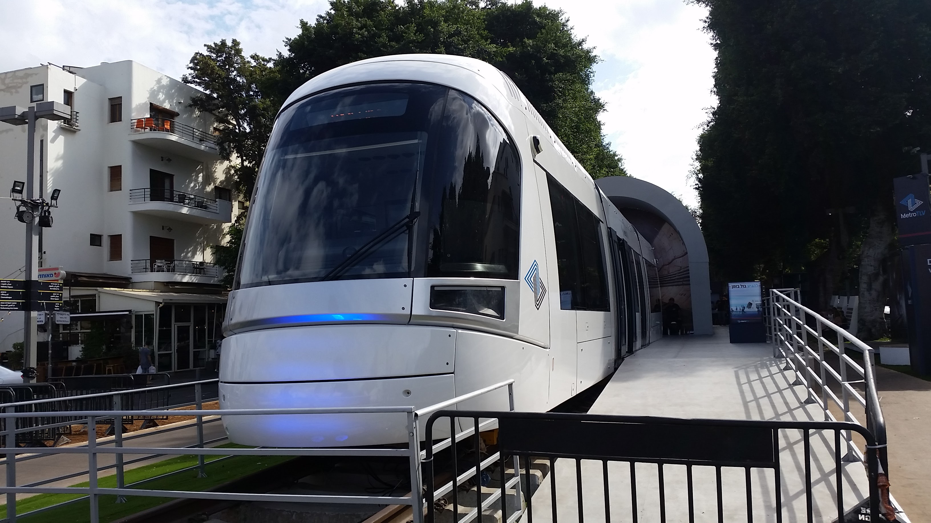 קרון להדגמה של רכבת קלה בתל אביב, שד' רוטשילד